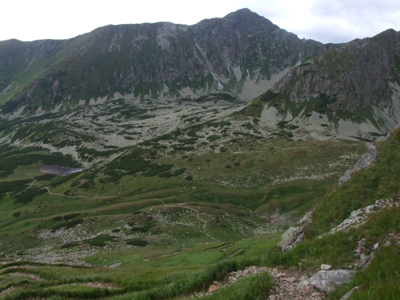 Dolina Bystra. W głębi Zadnia Kopa